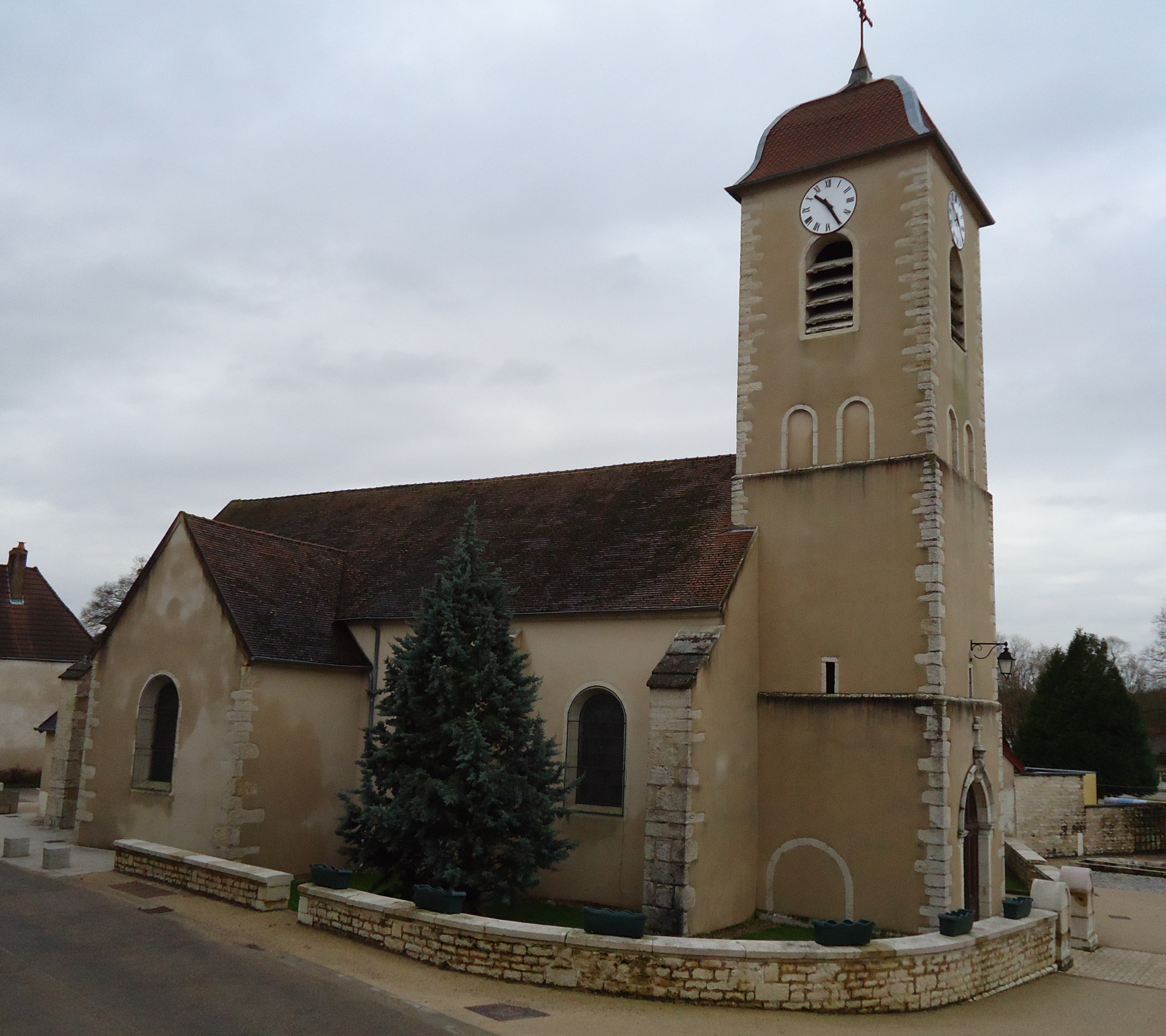 Eglise de Foucherans